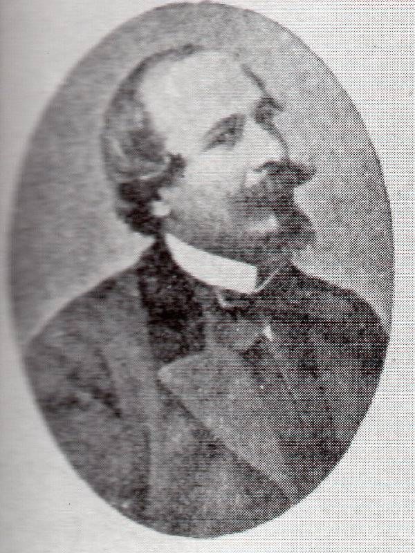 Ritratto di Nicola Palizzi (1820–1870) Alternative names Palizzi; n. palizziDescriptionItalian painterDate of birth/death 20 February 1820 20 September 1870 Location of birth/death Vasto NaplesAuthority control : Q3876303 VIAF: 224111005 ISNI: 0000 0003 6000 7135 ULAN: 500045991 GND: 122073266 BNF: 149688130 creator QS:P170,Q3876303 ripresa con scanner da Histonium ed il Vasto di Vittorio D'Anelli, 1978